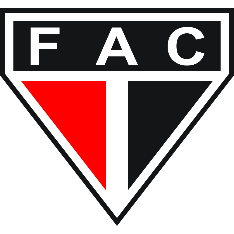 Escudo do Ferroviário Atlético Clube